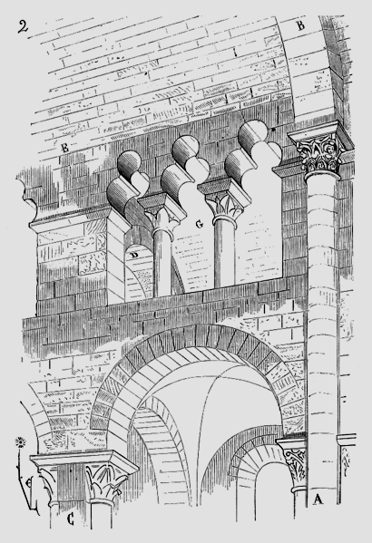 St-Austremoine d'Issoire, Triforium, Obergaden, Grafik